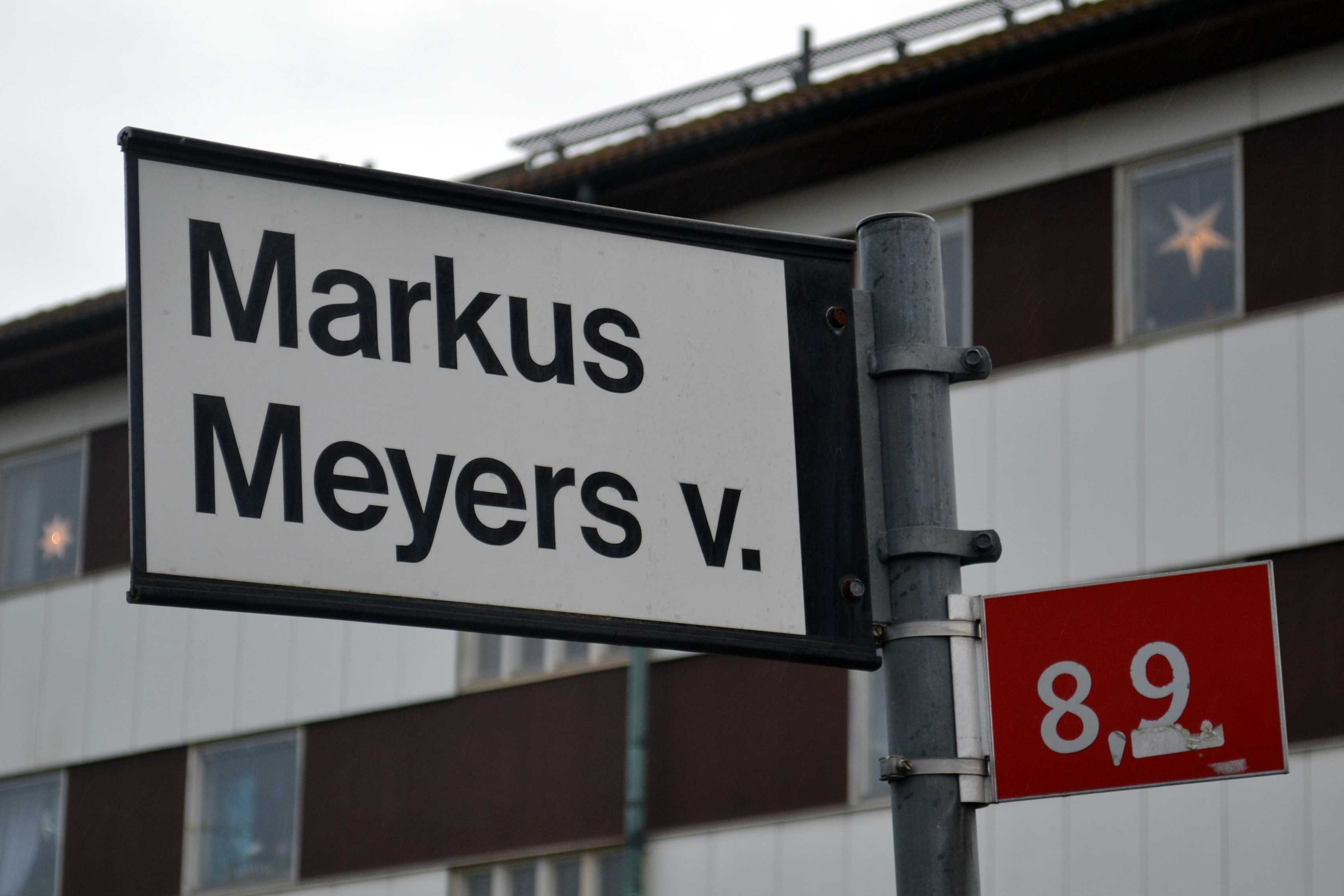 Gatuskylt, Markus Meyers väg, Varberg.